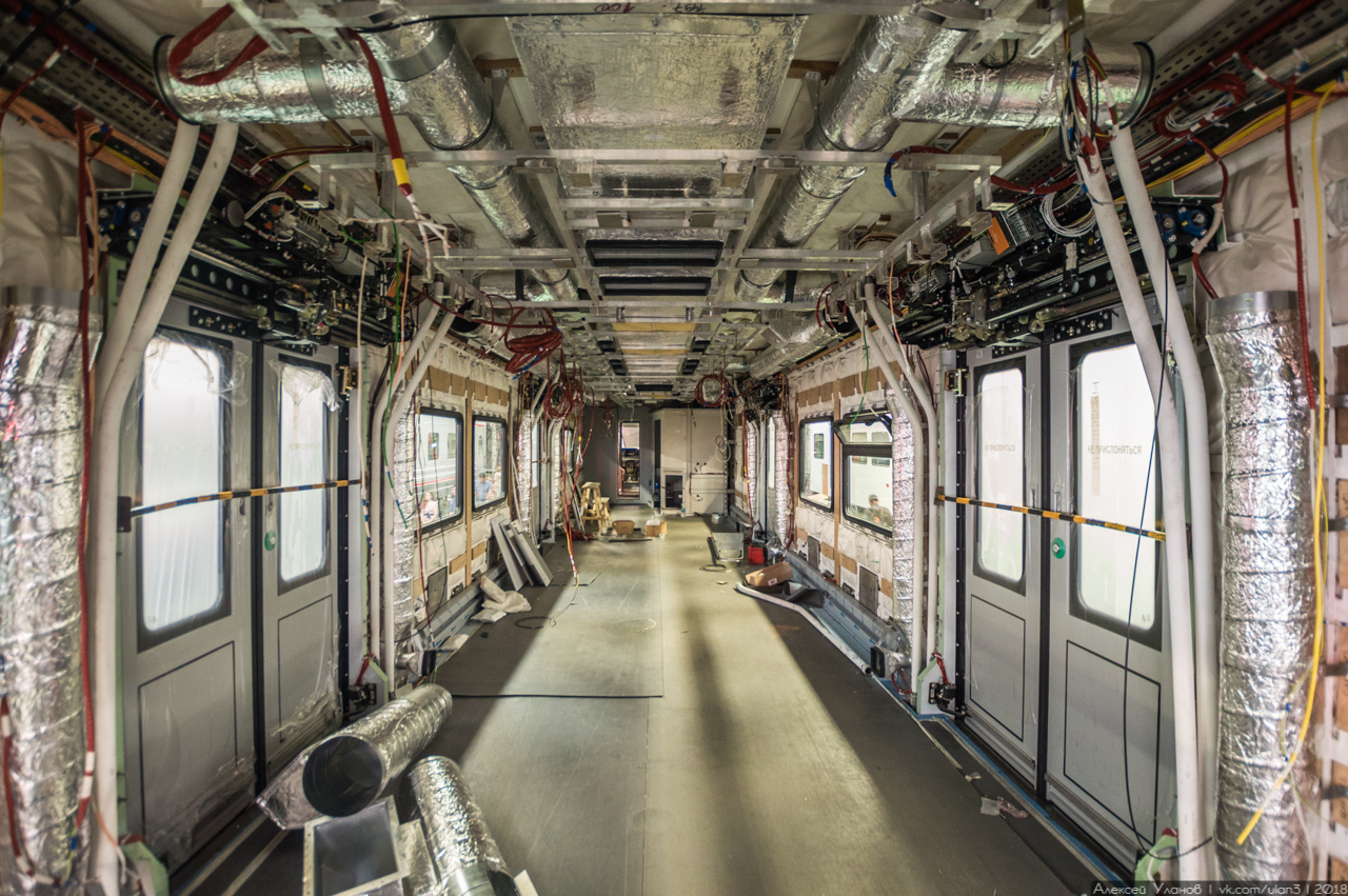 Установка внутрисалонного оборудования в вагоне электропоезда ЭГ2Тв-006